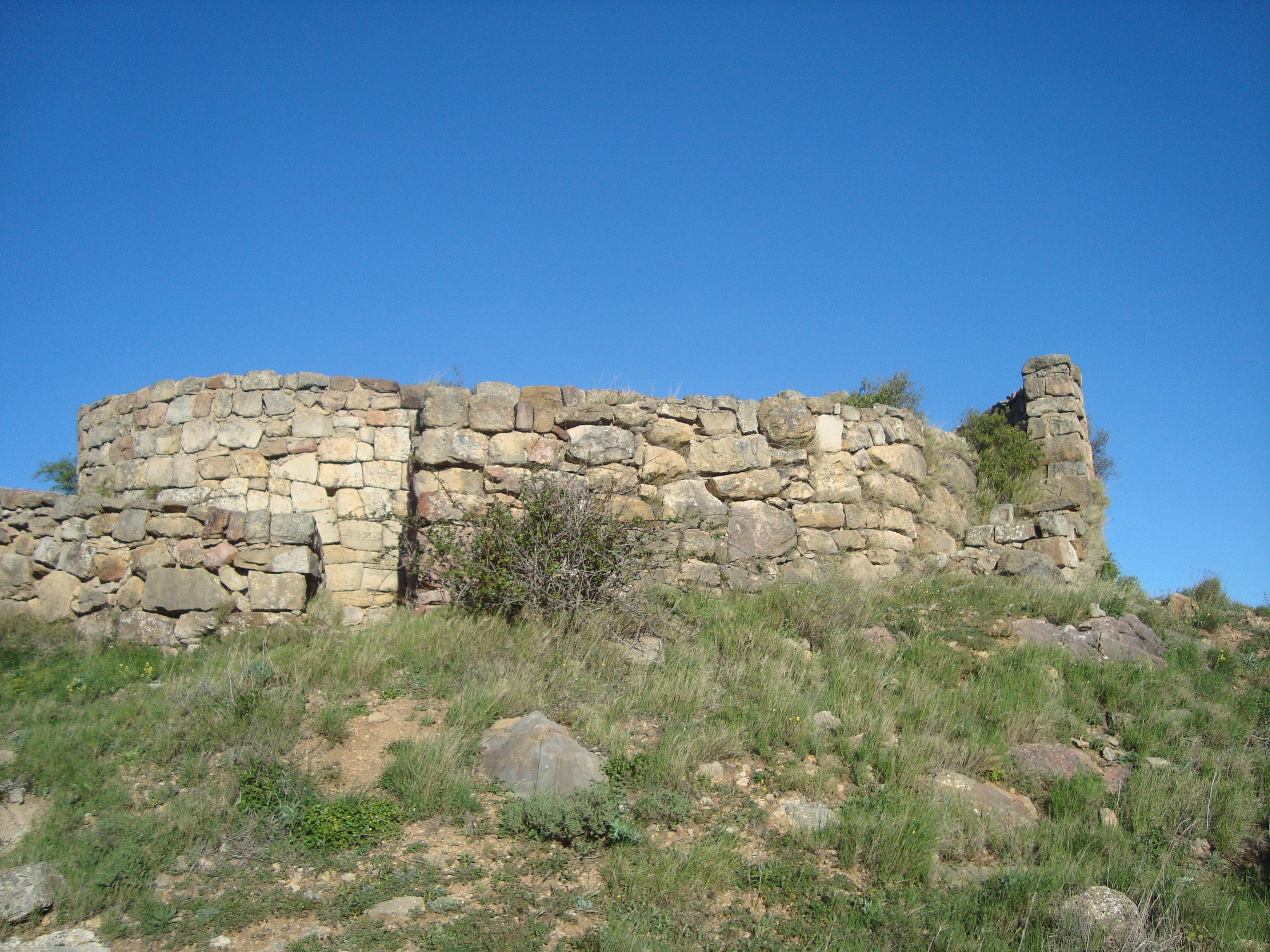 La torre de Foios es una torre de época ibérica ubicada en la comarca del Alcalatén en el término municipal de Lucena del Cid(Castellón). Esta declarado Bien de Interés Cultural y Monumento Histórico Nacional desde el año 1931. Valencià:Torre de Foios (Llucena, Castelló) La torre de Foios és una torre d'origen ibèric ubicada a la comarca de l'Alcalatén al terme municipal de Llucena (Castelló) . Protecció: És un Bé d'Interés Cultural i está declaració Monument Històric Nacional des de l'any 1931.